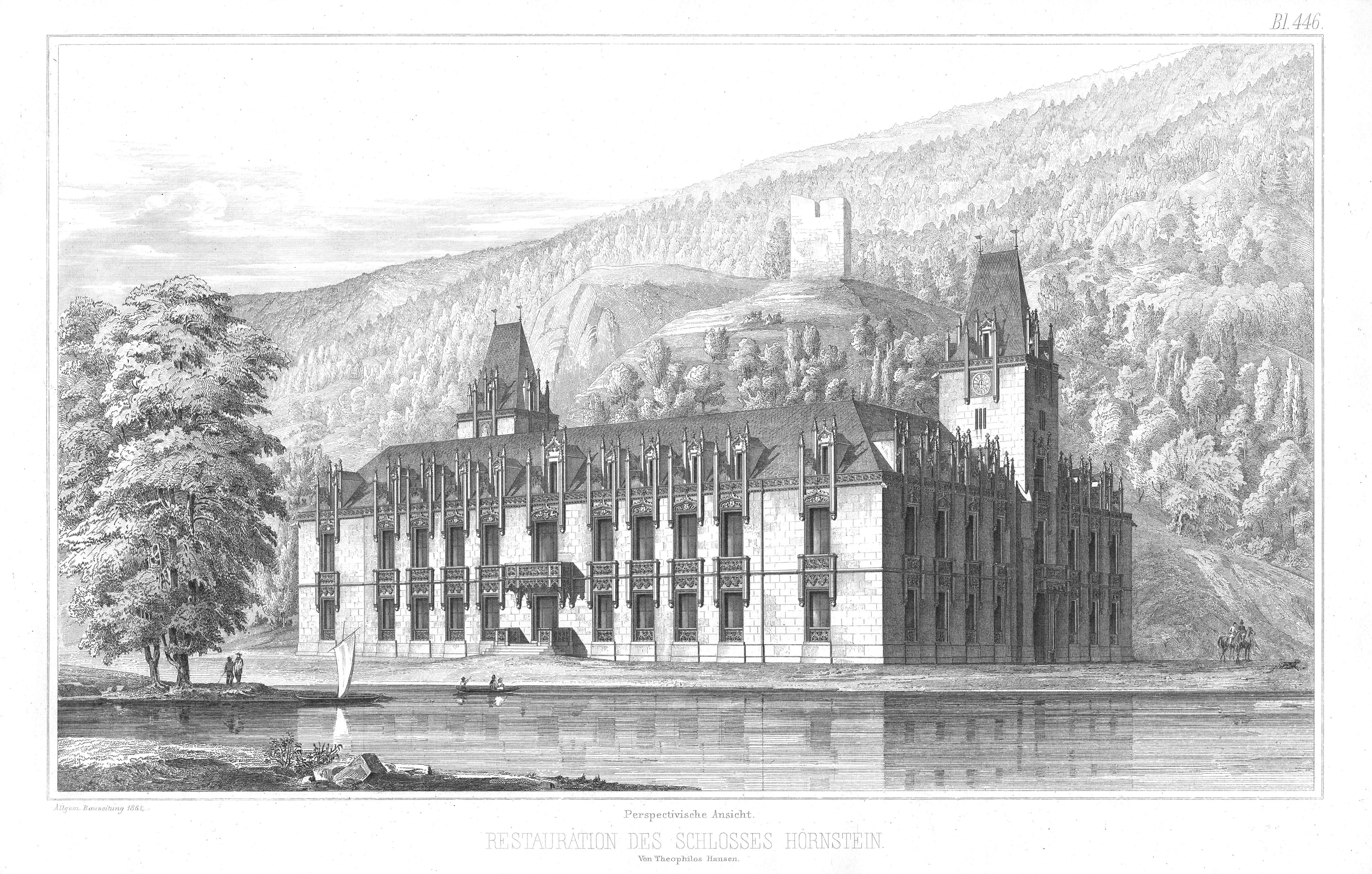 Pläne von Theophil Hansen für die Renovierung des Schlosses Hernstein (auf den Plänen Hörnstein) veröffentlicht in der Allgemeinen Bauzeitung, 1861. Der Umbau erfolgte von 1855-1880, die Pläne müssen also vor 1861 entstanden sein.